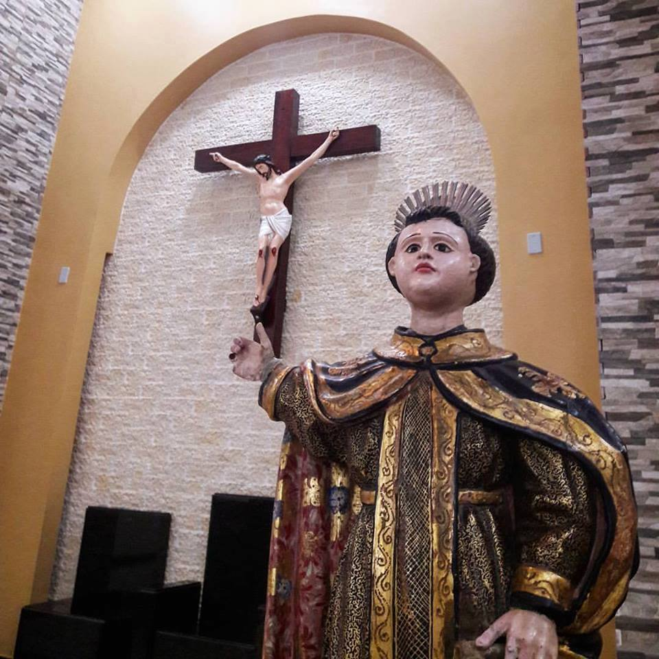 Imagem centenária de São Vicente Ferrer, Laje Grande.